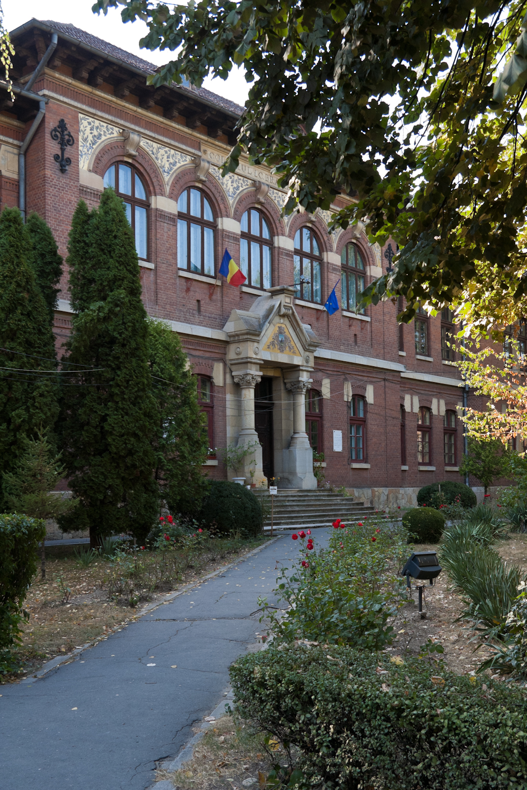 Fotografia prezinta intrarea principala in liceul "I.C. Brătianu", vazut dinspre E.